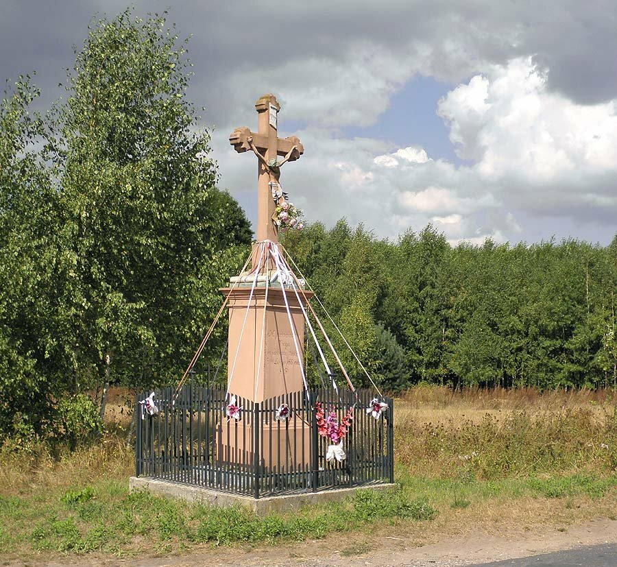 Krzyż z 1864 roku w podskaryszewskim Bujaku.